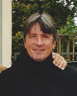 Le footballeur suisse Gérard Castella.